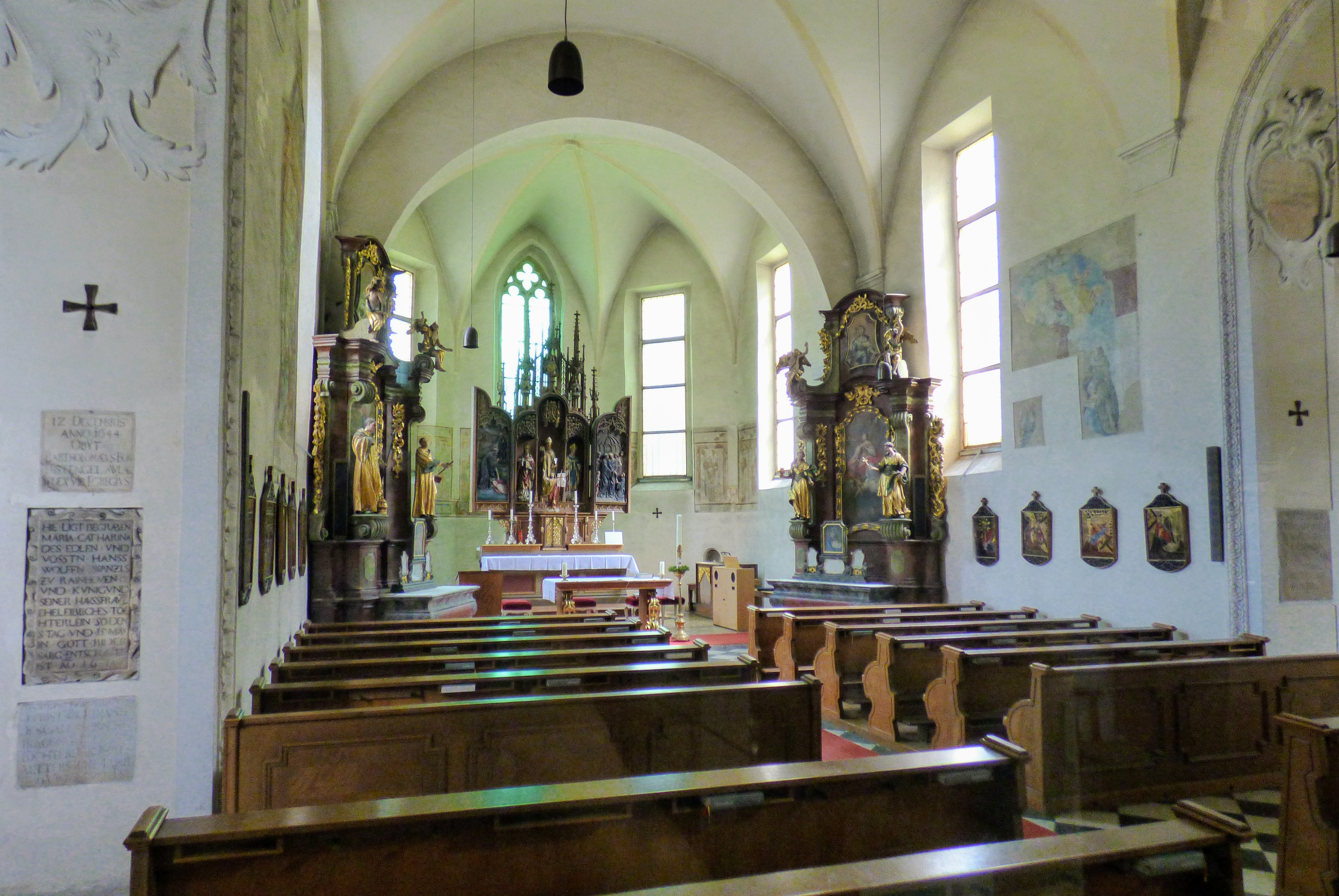 Inneres der Kirche Hl. Erhard, St. Paul im Lavanttal.